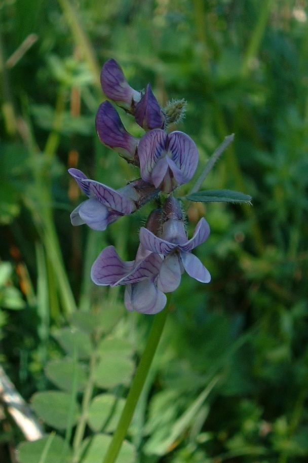 Vesce des haies (Vicia sepium), photo J.F. Gaffard, Montboillon,avril 2004